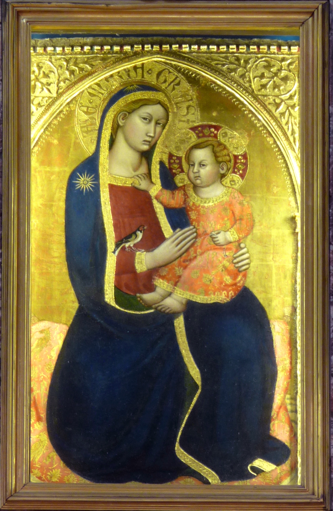 altarpiece